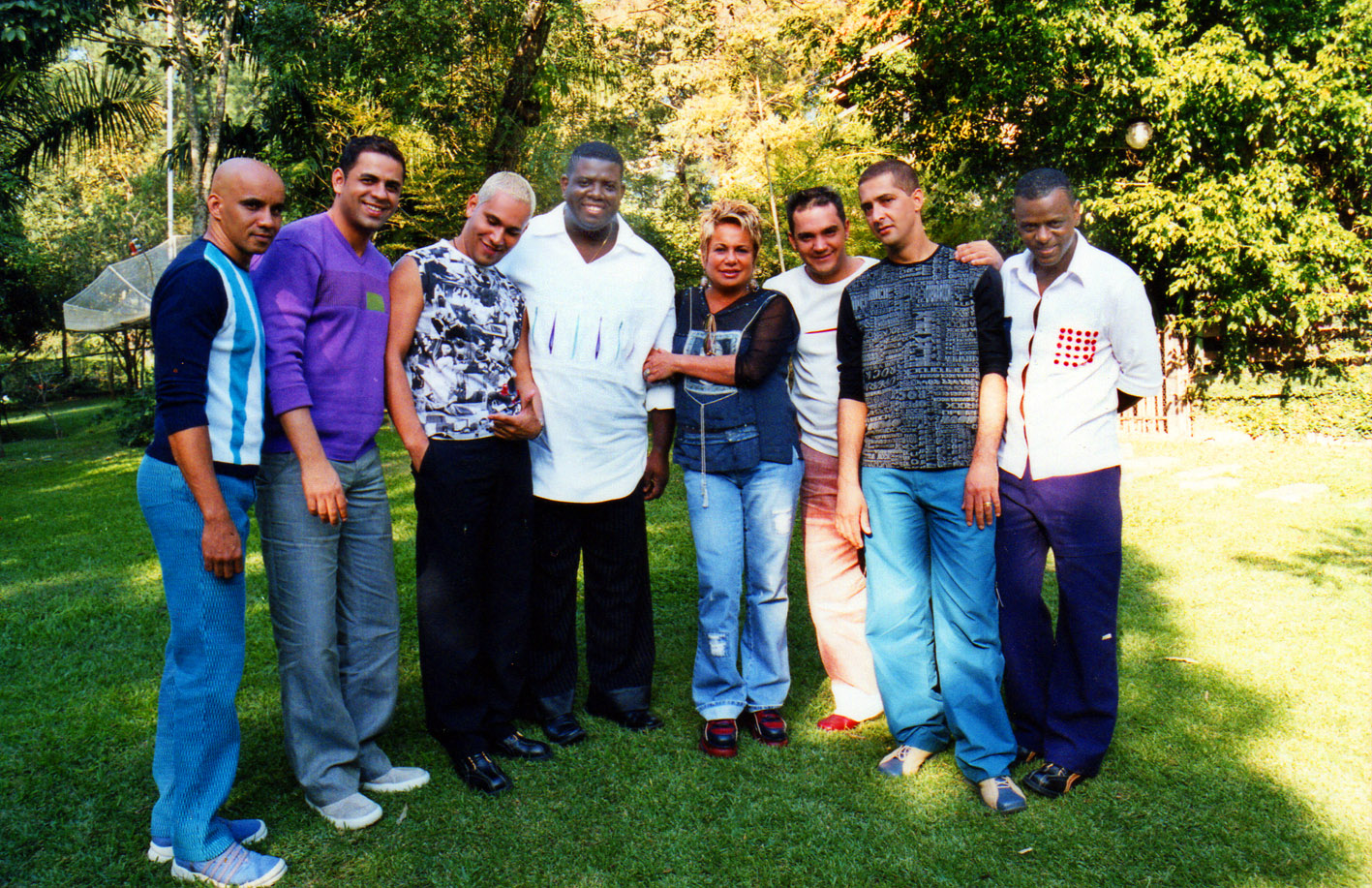 Miriam e o Exaltasamba no Spa 7 voltas.